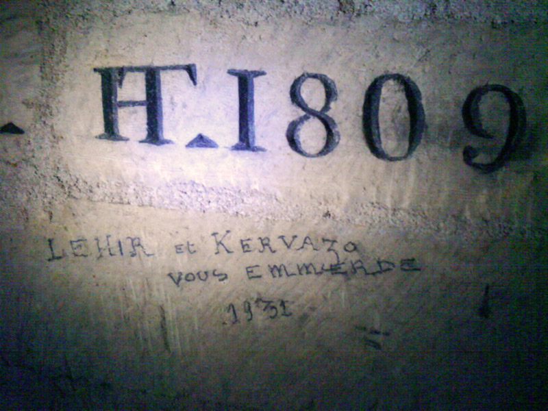 Trace écrite sur une confortation construite sous Héricart de Thury, en 1815, dans le réseau de carrières de Chaillot (16e arrondissement de Paris, France).